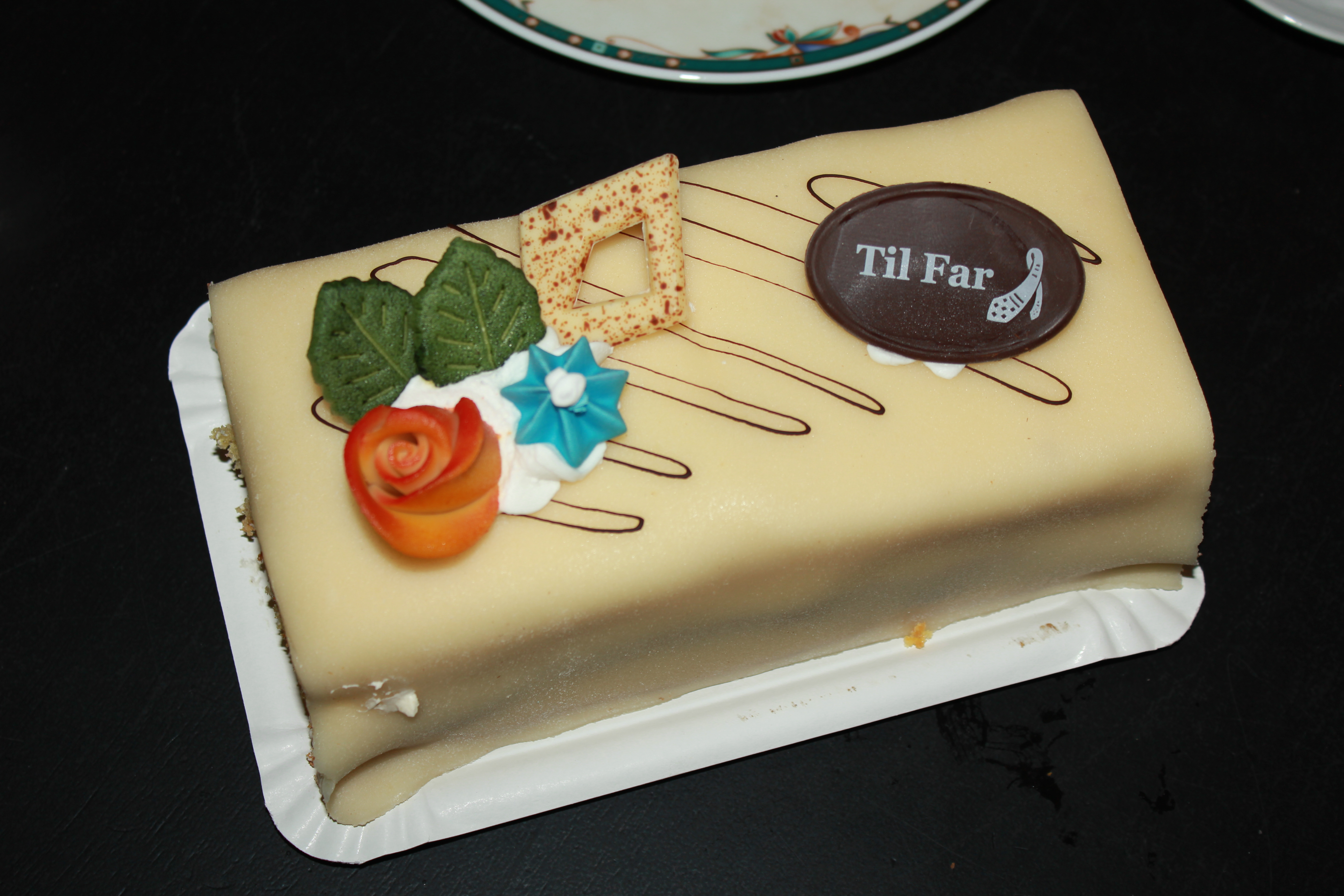 Farsdagskake